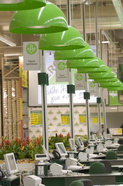 Caisses d'un magasin Leroy Merlin en Grèce.